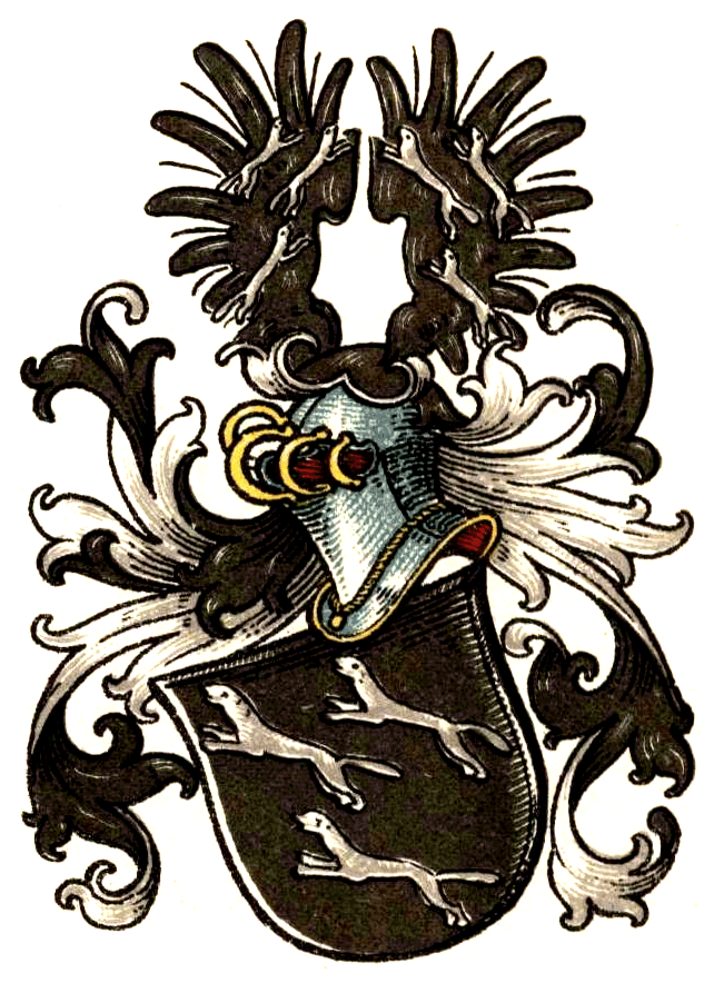 Wappen derer von Harmen